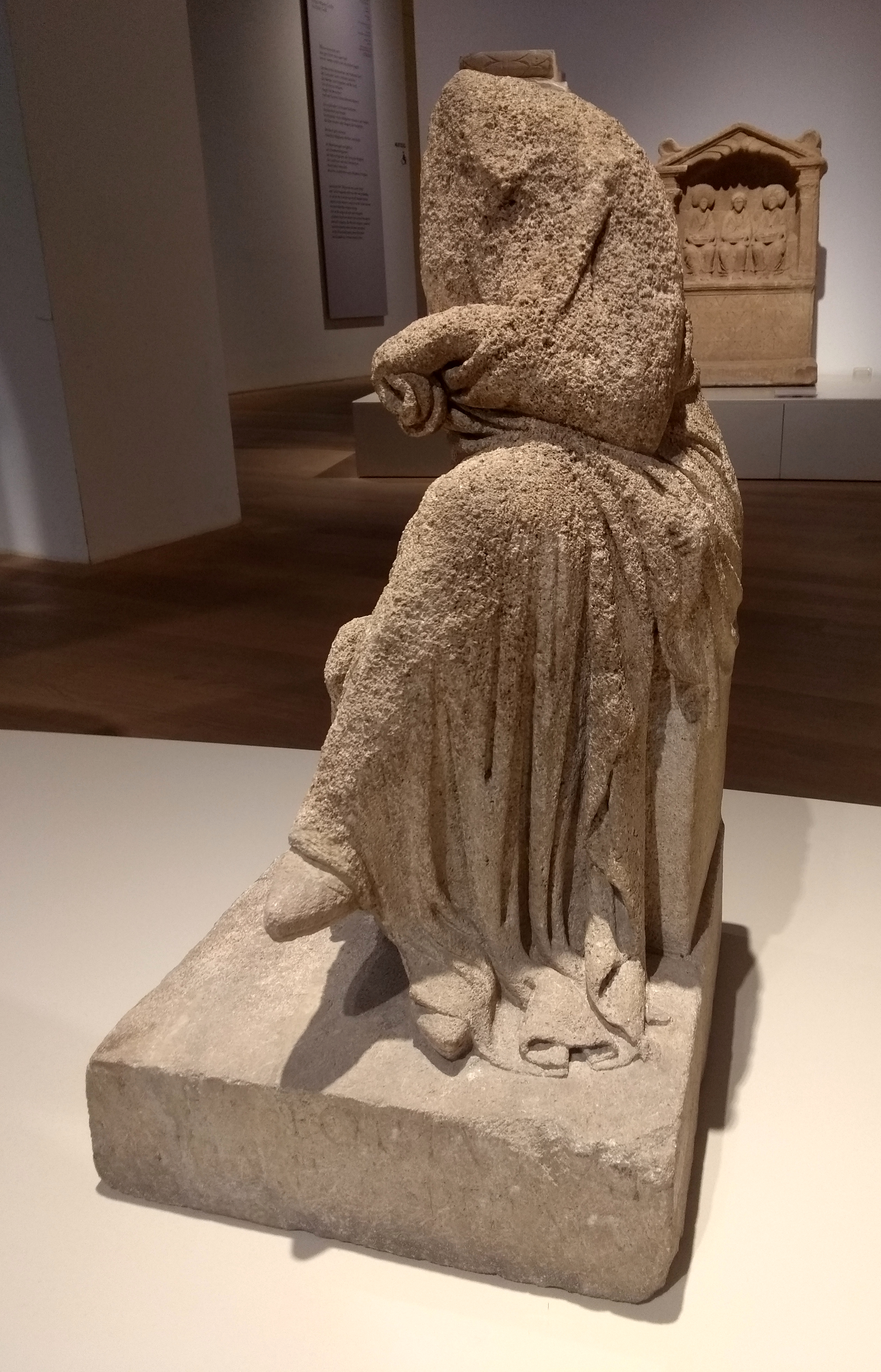 Fortuna-Statue aus Bermel bei Monreal, Kreis Mayen-Koblenz, heute im Rheinischen Landesmuseum Bonn (CIL XIII,7699)